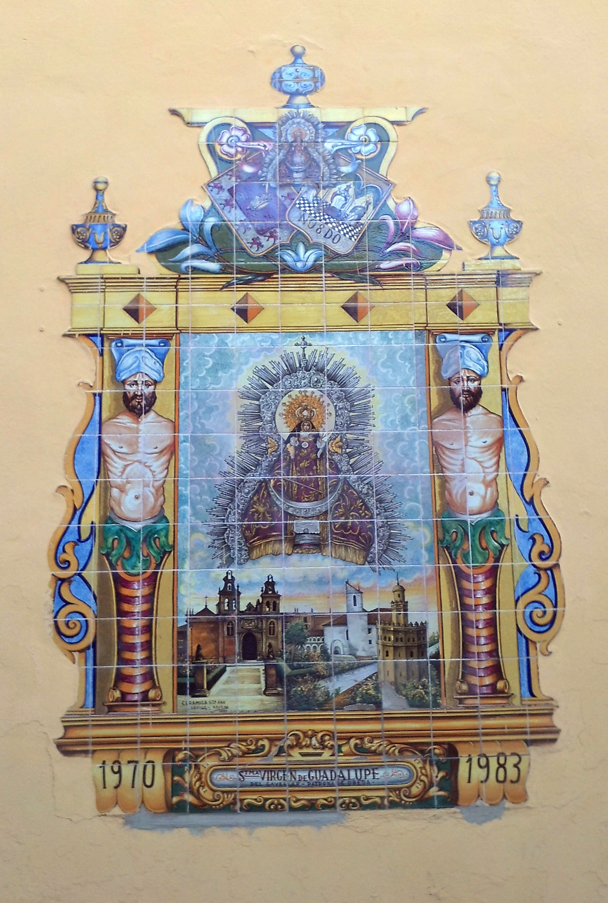 Azulejo de la Virgen de Guadalupe, patrona de Úbeda, en la iglesia del antiguo hospital de la Misericordia. Sevilla, Andalucía, España.